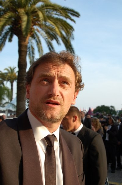 Jean-Paul Rouve au festival de Cannes.